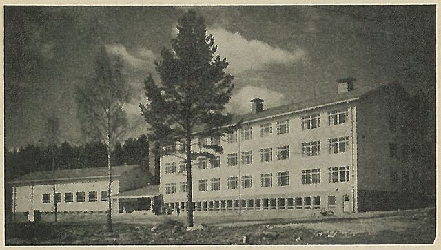 Vaajakosken vanha yhteiskoulu